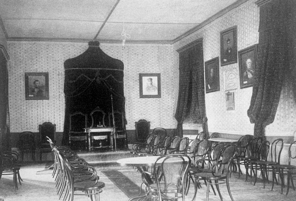 Mérida, Venezuela. Antiguo Salón de Actos de la Universidad de Los Andes